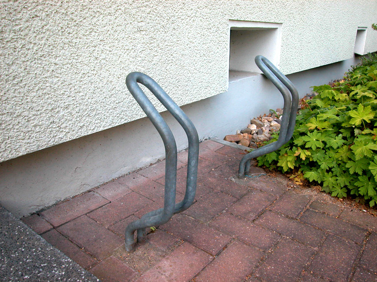 Die Straße «Balckestraße» in Benrath, Düsseldorf